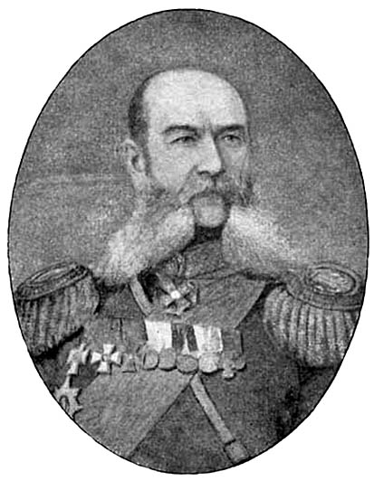 генерал-майор С. В. Рыкачёв